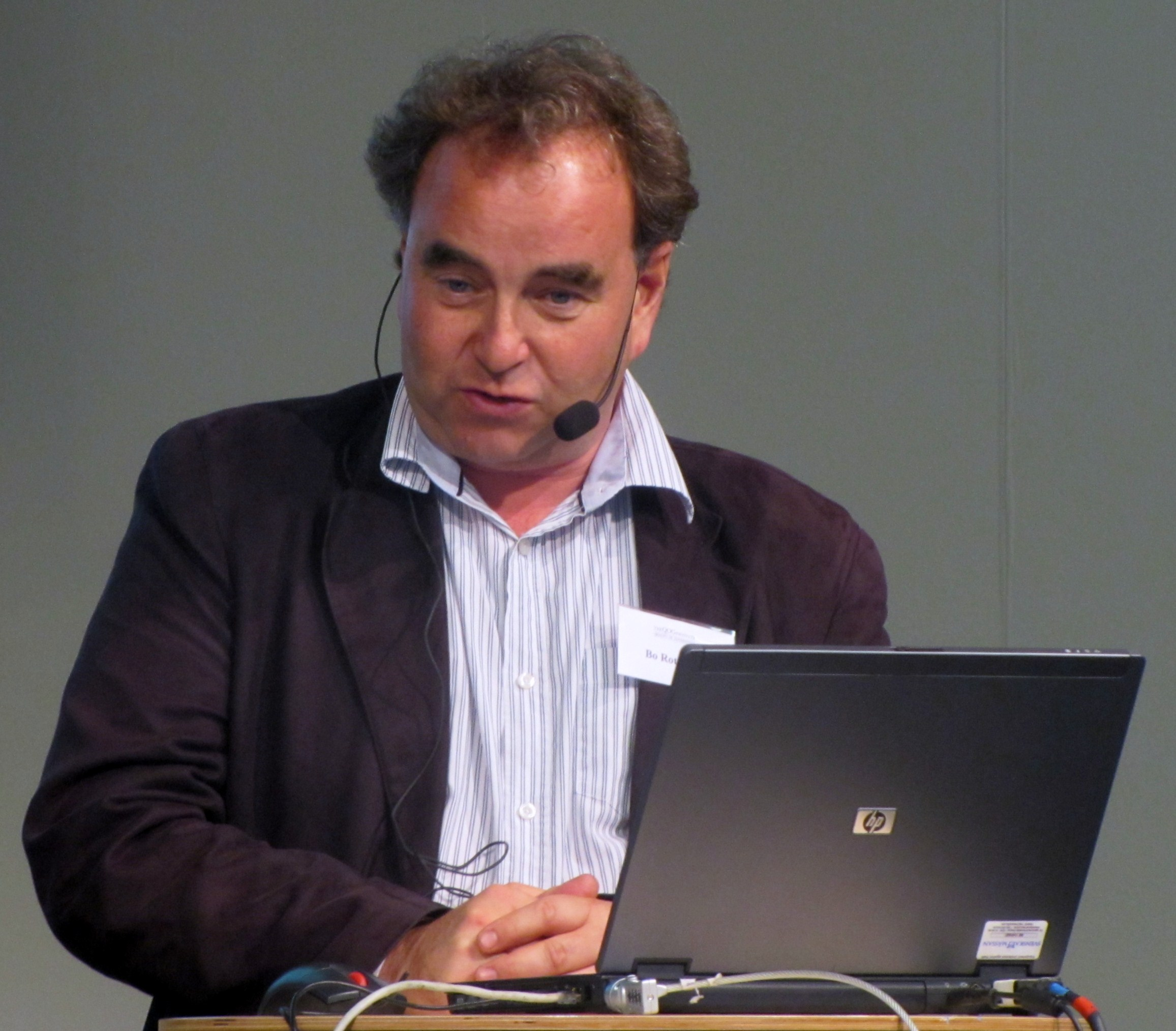 Bo Rothstein, professor i statsvetenskap vid Göteborgs universitet.